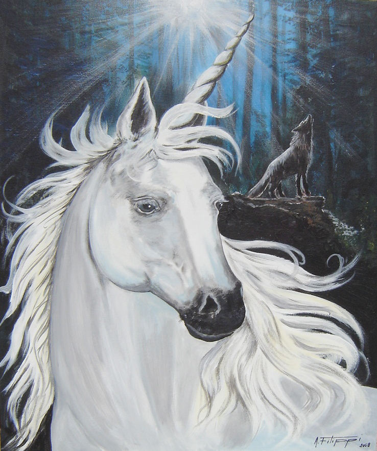 Tableau de Licorne - Style onirique - Acrylique sur toile 550x460